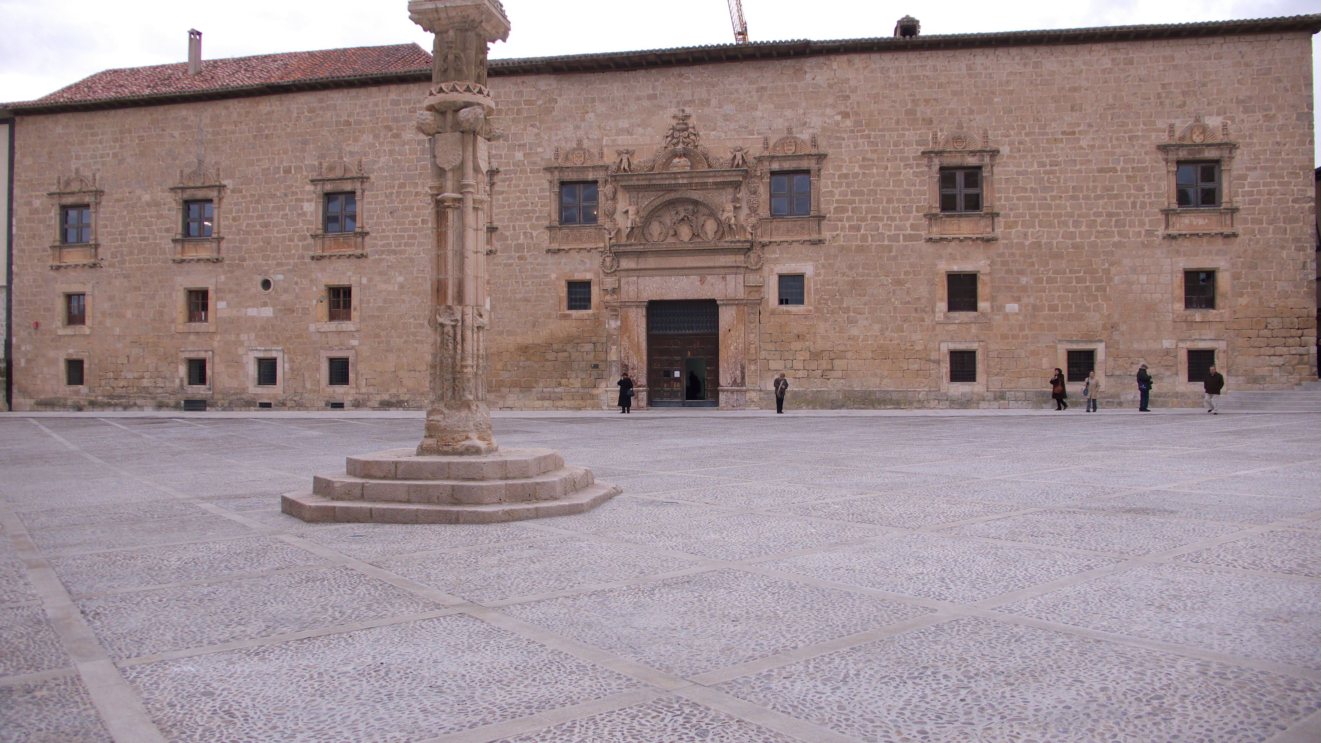 Palacio de primeros del siglo XVI, promovido por Francisco de Zúñiga y Avellaneda. Atribuido a Francisco de Colonia (1470-1542)